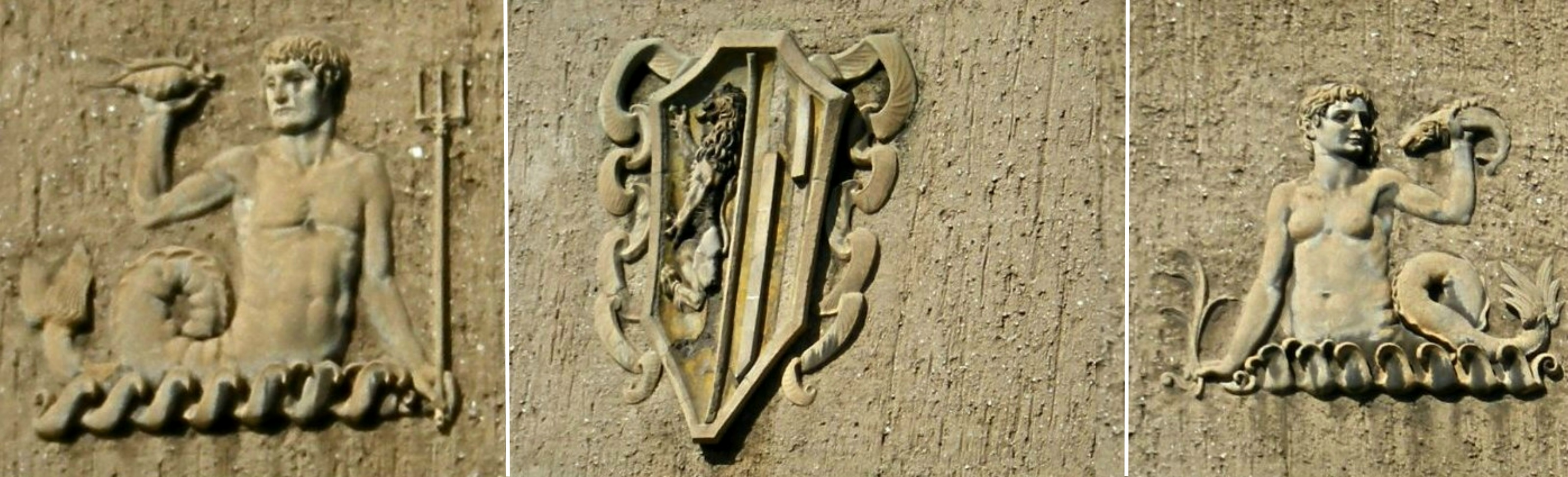 Das Sachsenbad Dresden ist eine ehemalige Schwimmhalle auf der Wurzener Straße 18 im Dresdner Stadtteil Pieschen. Bis in die 1990er-Jahre hinein war es in Betrieb. Derzeit steht es nun schon seit mehreren Jahren leer.